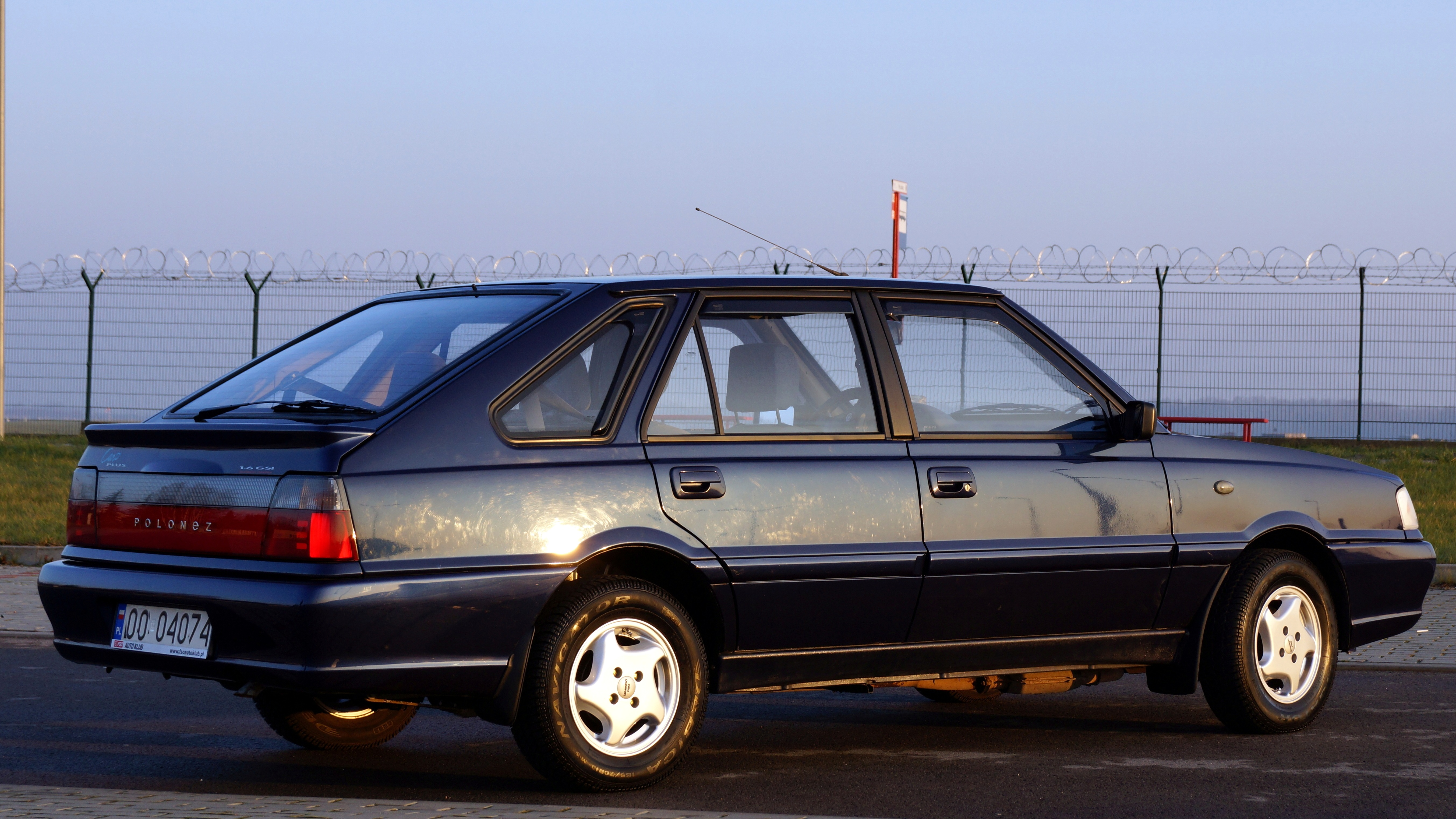 Daewoo-FSO Polonez Caro Plus z 2001 roku.